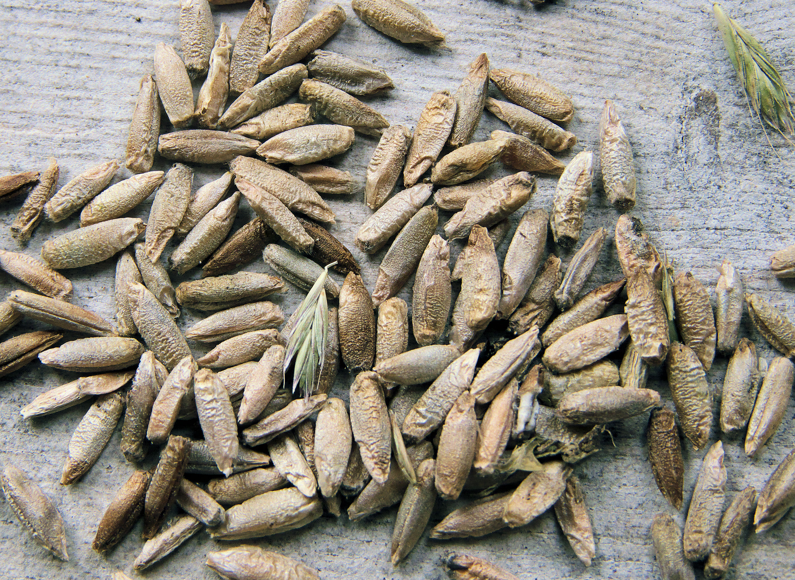 Secale cereale (roggekorrels, biologisch geteeld)